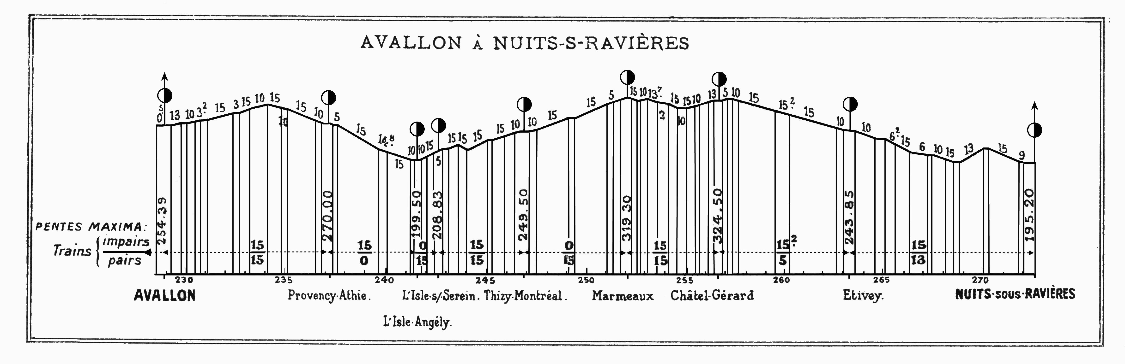 Streckenprofil Bahnstrecke Avallon–Nuits-sous-Ravières, PLM; 1904